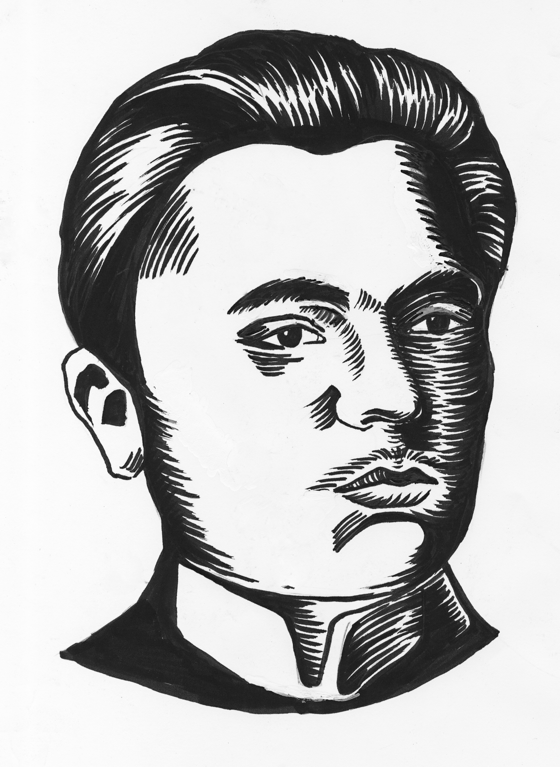 Taavet Rootsmäe, tušš